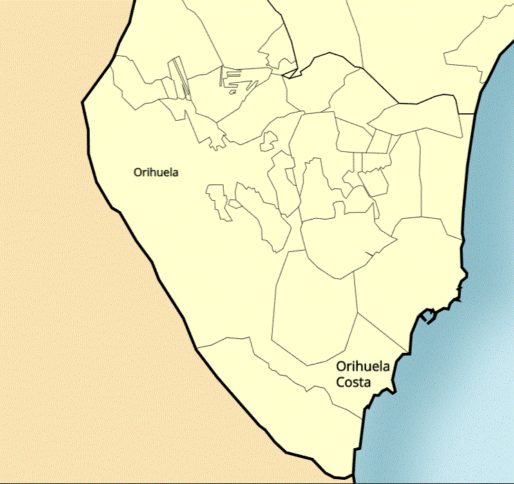 Ubicación de Orihuela Costa dentro del municipio de Orihuela.